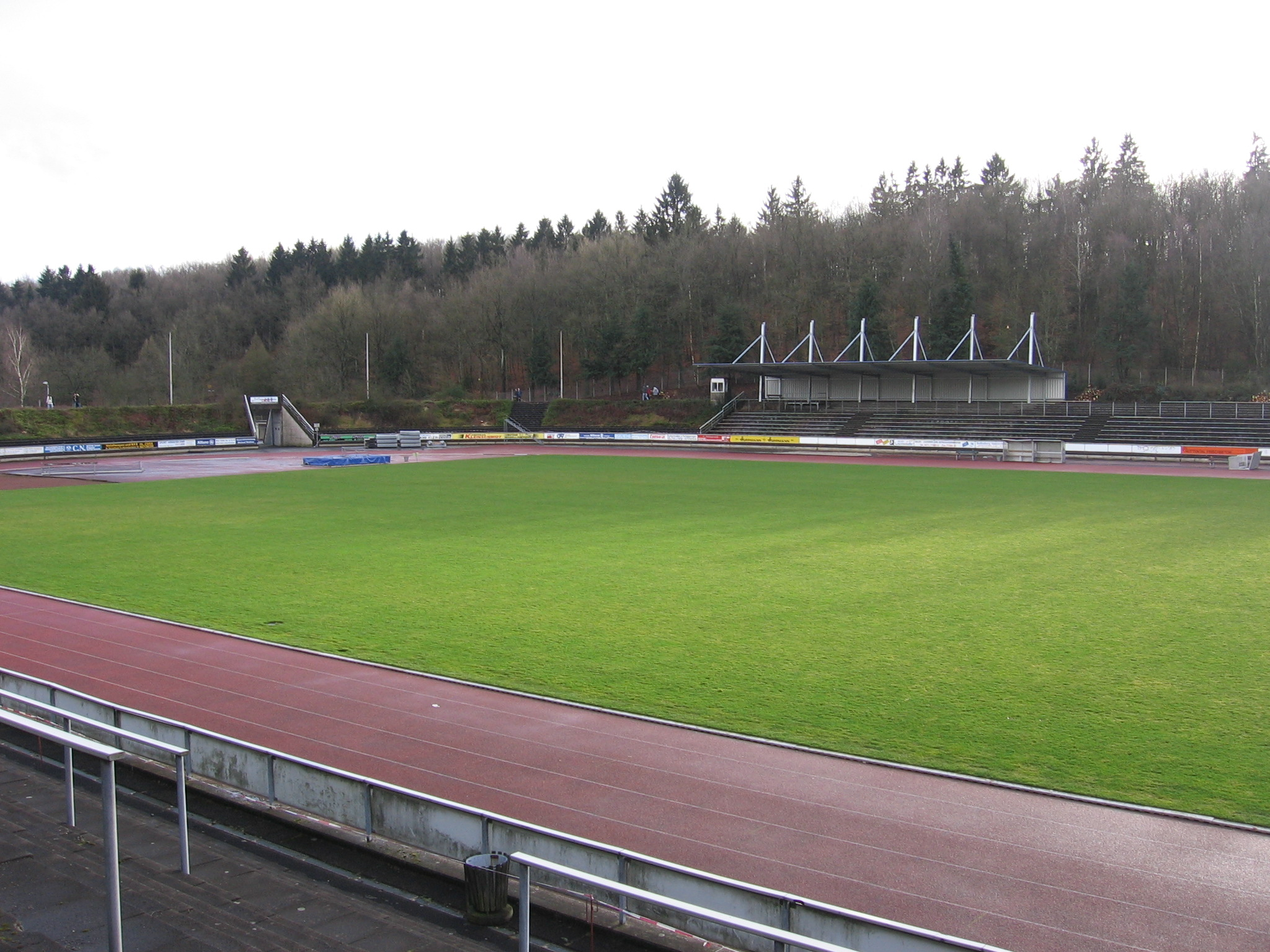 Rasenplatz Hofbachstadion Siegen-Geisweid